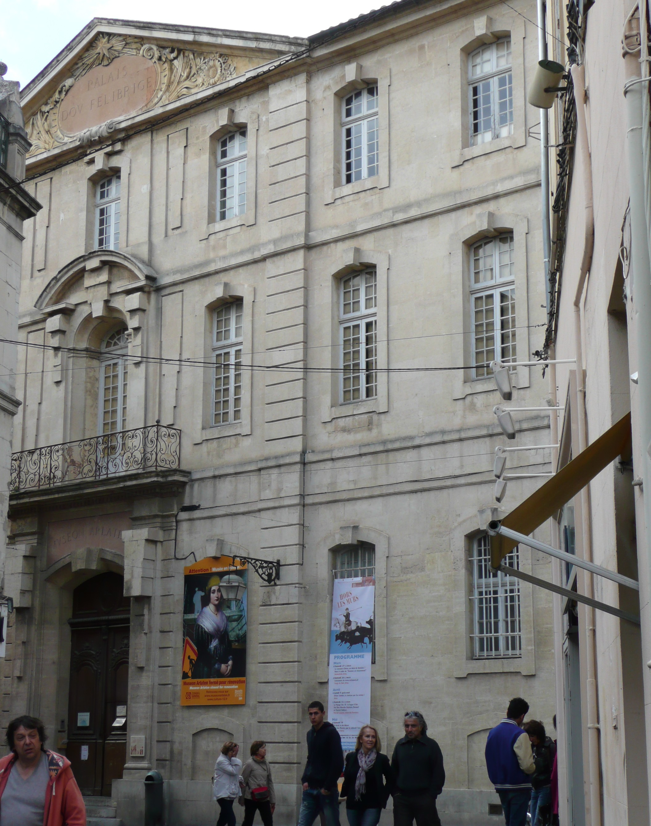 Au 29 rue de la République à Arles (Bouches-du-Rhône), hôtel particulier Laval-Castellane, racheté en 1648 par les Jésuites pour y déplacer leur collège alors sur le site du Théâtre Antique, et cédé par la municipalité à Frédéric Mistral qui y installa son Museon Arlaten.